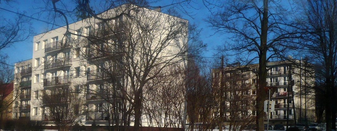 Fragment osiedla Stoki - bloki z "wielkiej płyty", z czasów PRL- u.